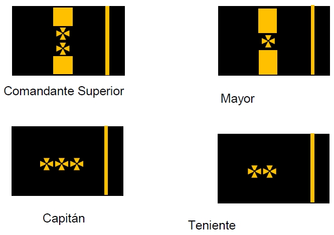 Presillas para el personal de oficiales en uniforme de calle del cuerpo de custodia y vigilancia nacional del INPEC